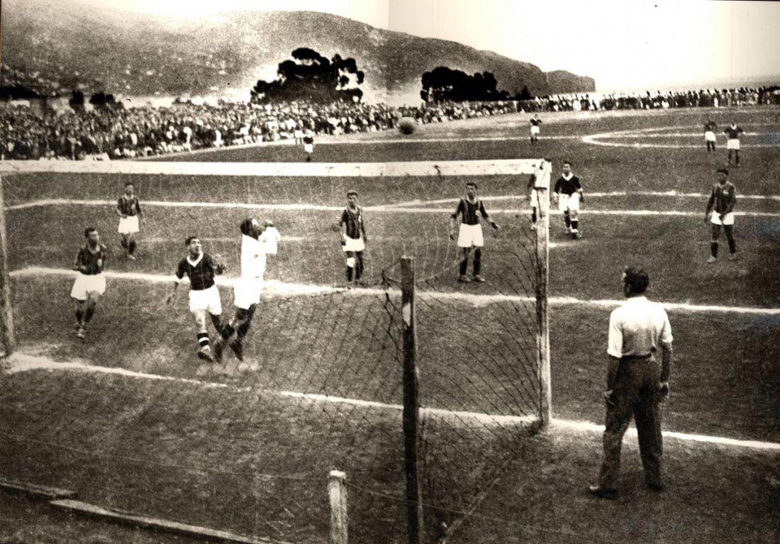 Antigo Stadium dos Barreiros. Jogo do Club Sport Marítimo e do Benfica, 1936.